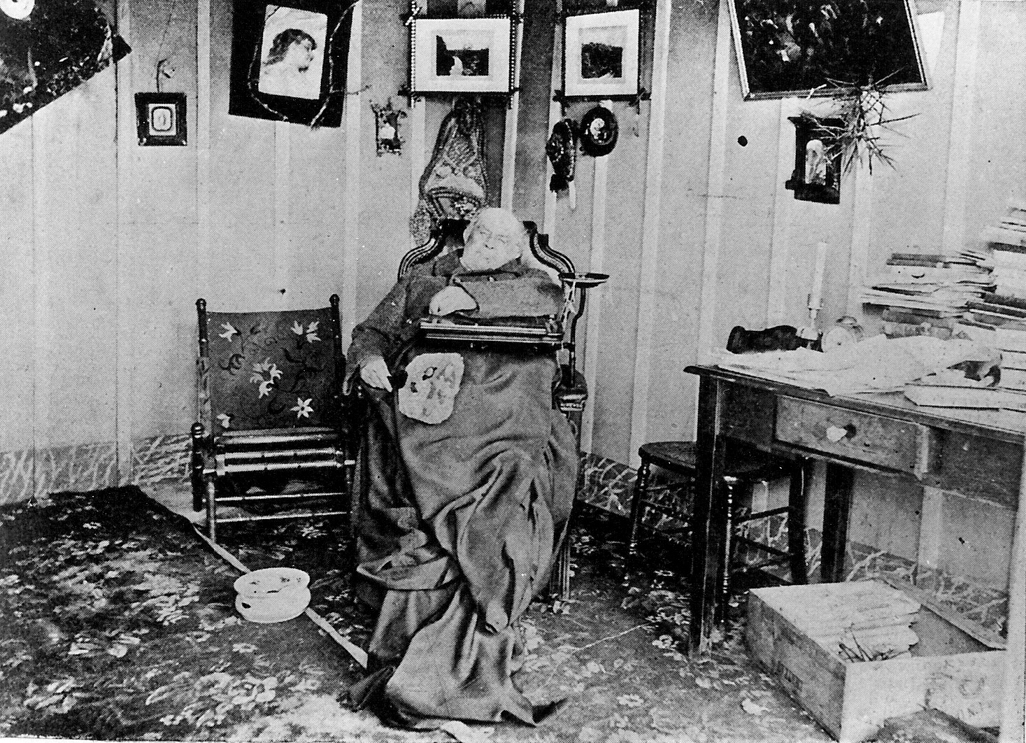 Domingo Faustino Sarmiento acaba de fallecer en su casa de Asunción del Paraguay. 11 de septiembre de 1888. Foto reproducida en Caras y Caretas Nr. 39 del 9/9/1899.